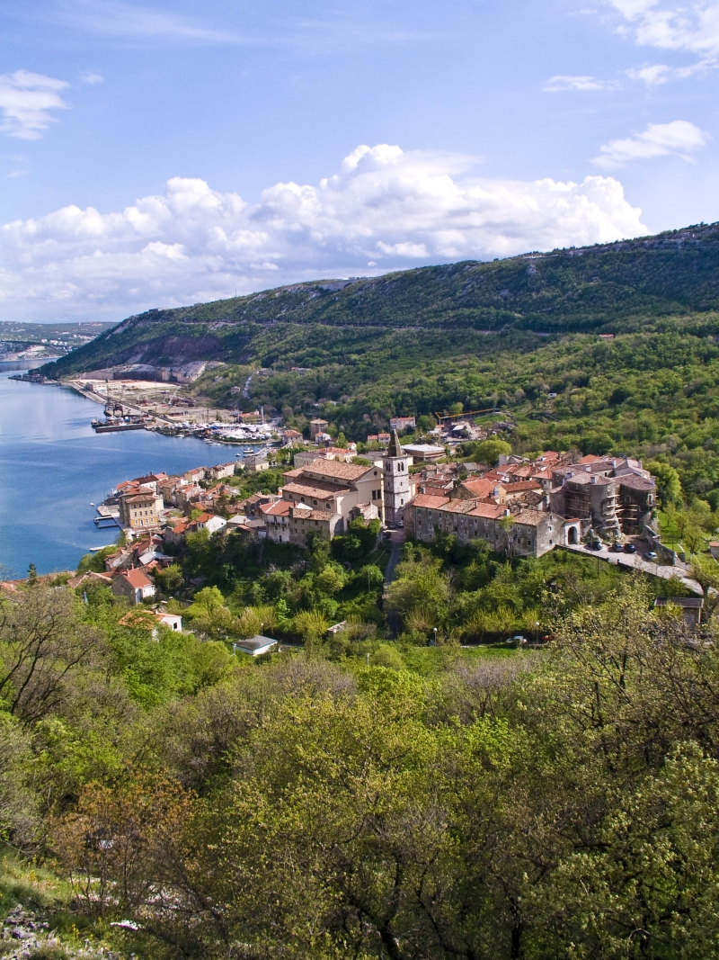 grad Bakar